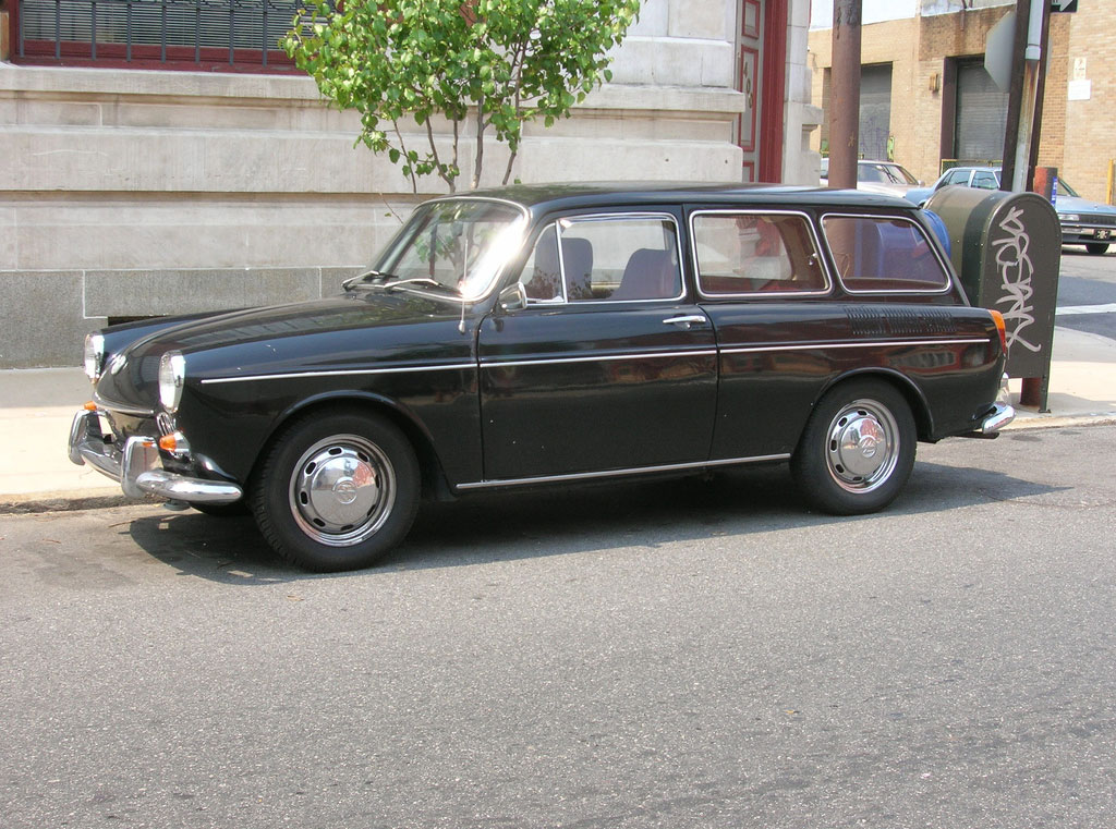 1966 Volkswagen 1600 Squareback